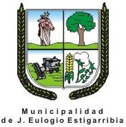 La bandera de la ciudad, la misma fue ratificada y reconocida por la Junta Municipal a través de la Ordenanza Municipal Nº 8 de fecha 11 de setiembre del año 1993. Los tres colores elegidos son: Amarillo, Blanco y Lila más un triángulo color Verde